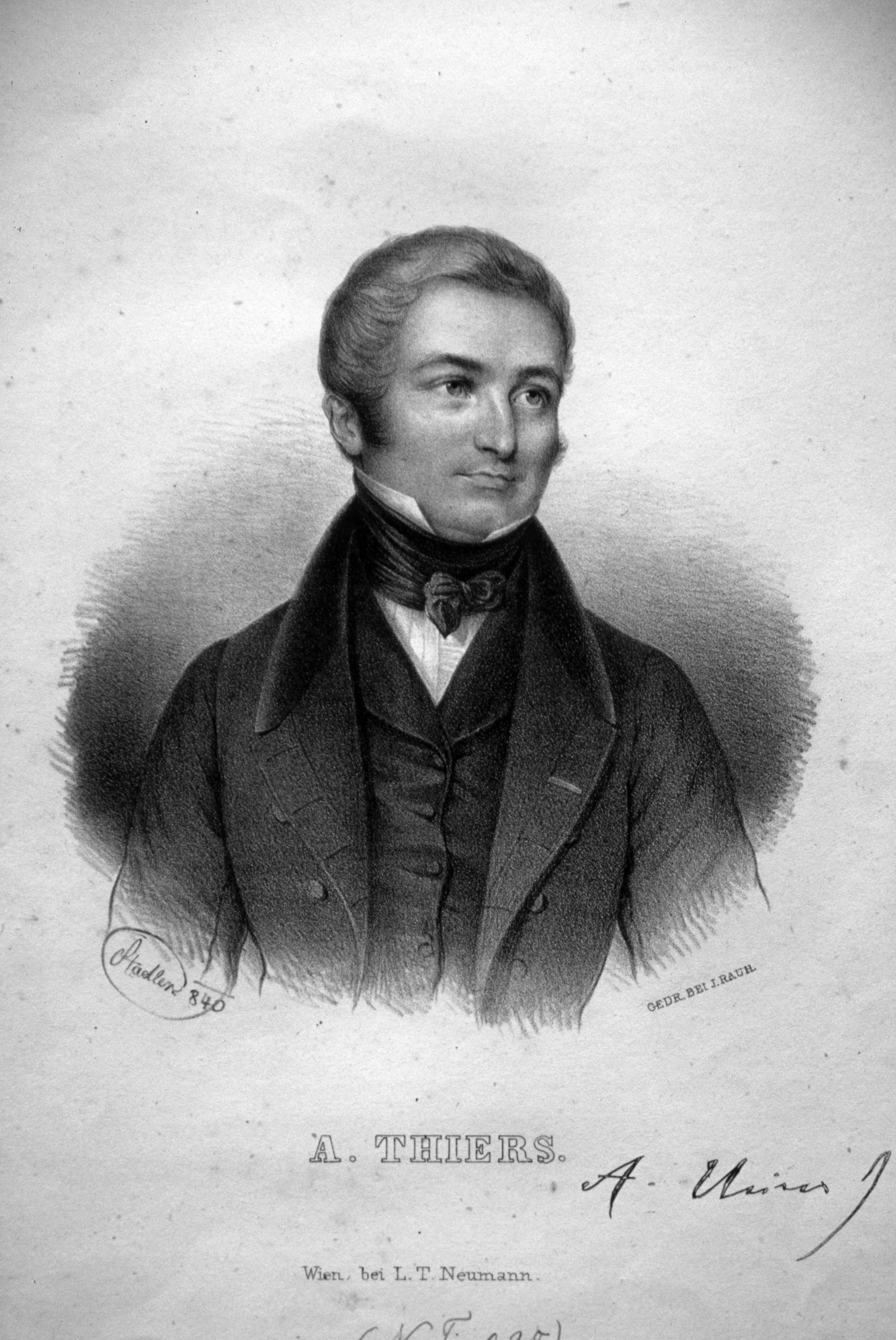 Adolphe Thiers (1797-1877), französischer Politiker, Historiker. Lithographie von Johann Stadler, 1840